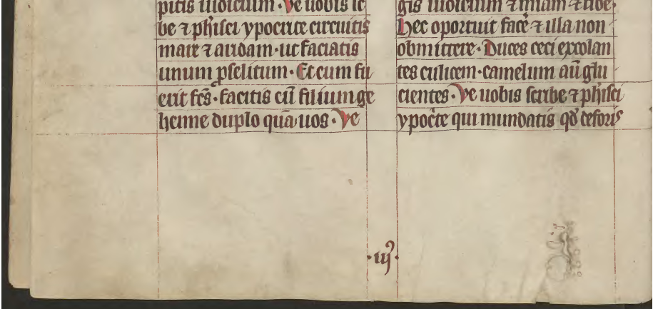 Rękopis pergaminowy Nowego Testamentu, pochodzi z klasztoru franciszkanów w Sączu. Na dole strony przykład kustosza w książce rękopiśmiennej.